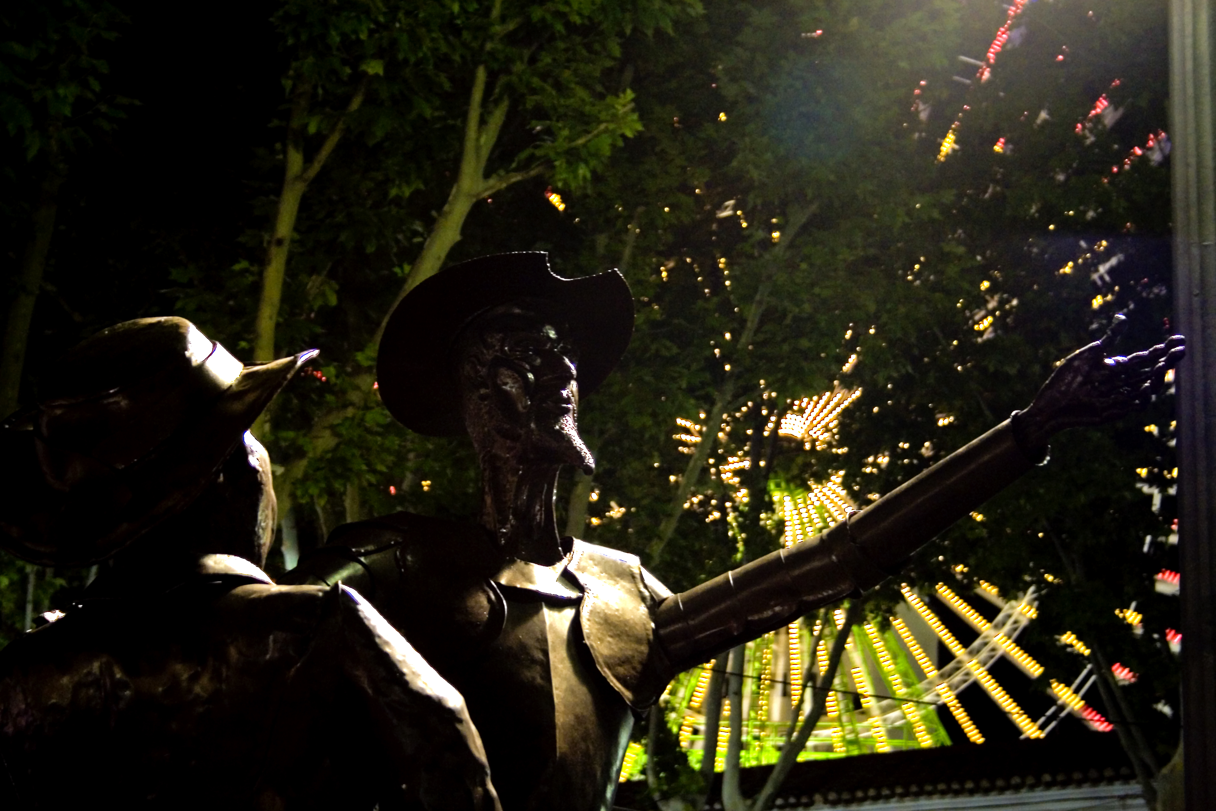 Don Quijote y Sancho en la Feria